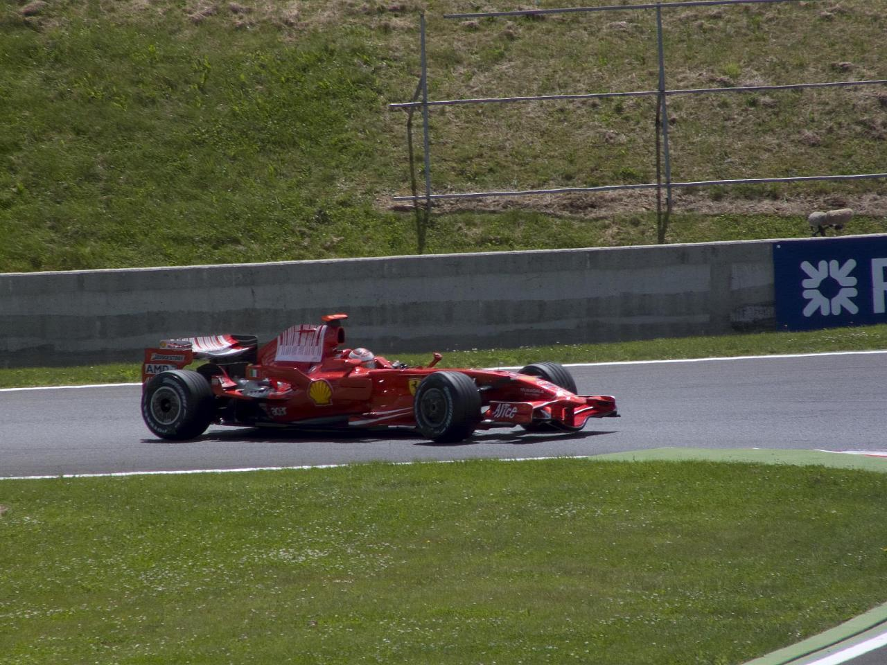 Kimi Raikkonen at 2008 French Grand Prix